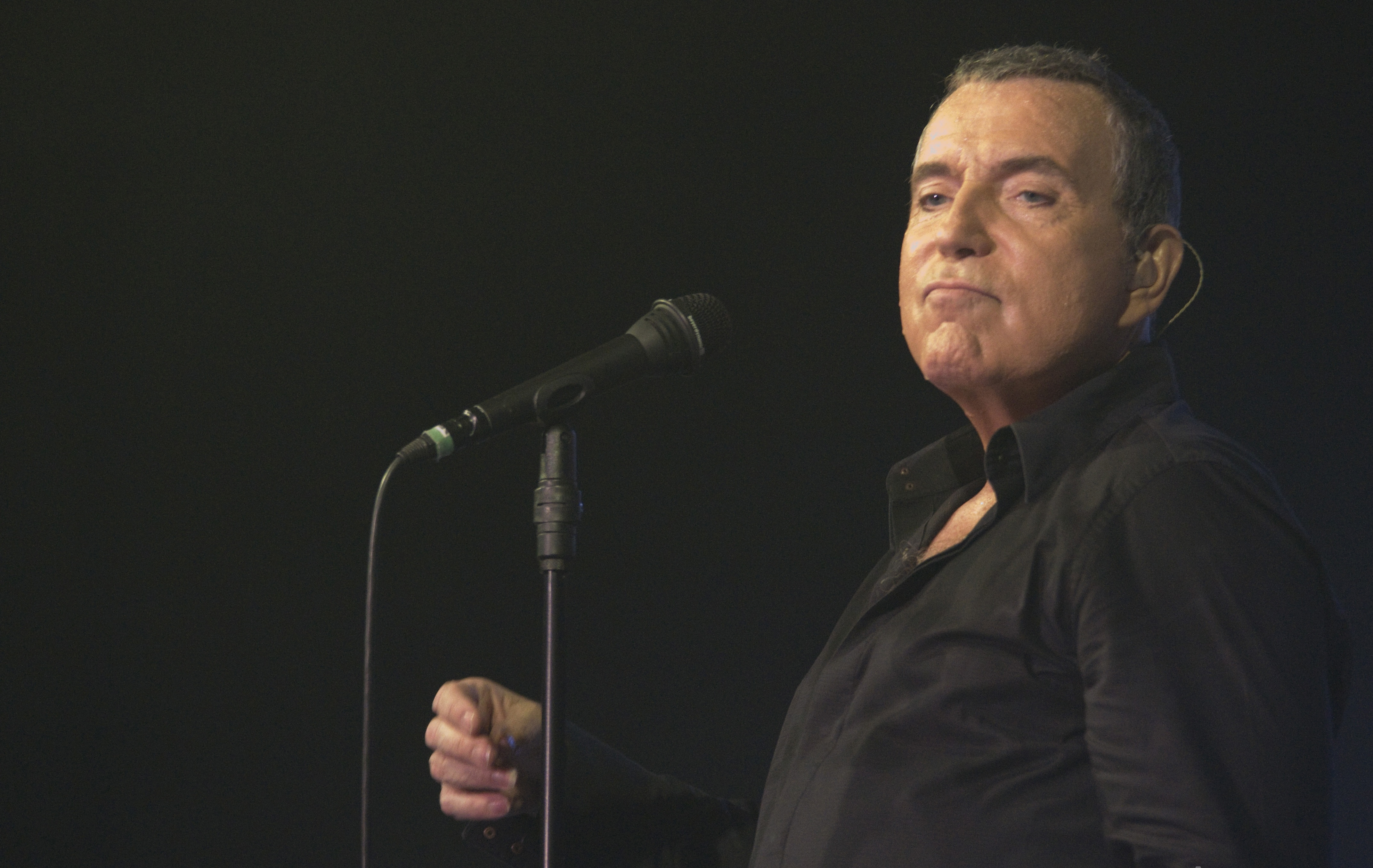 Bernard Lavilliers en concert le 26 avril 2008 à Auxerre